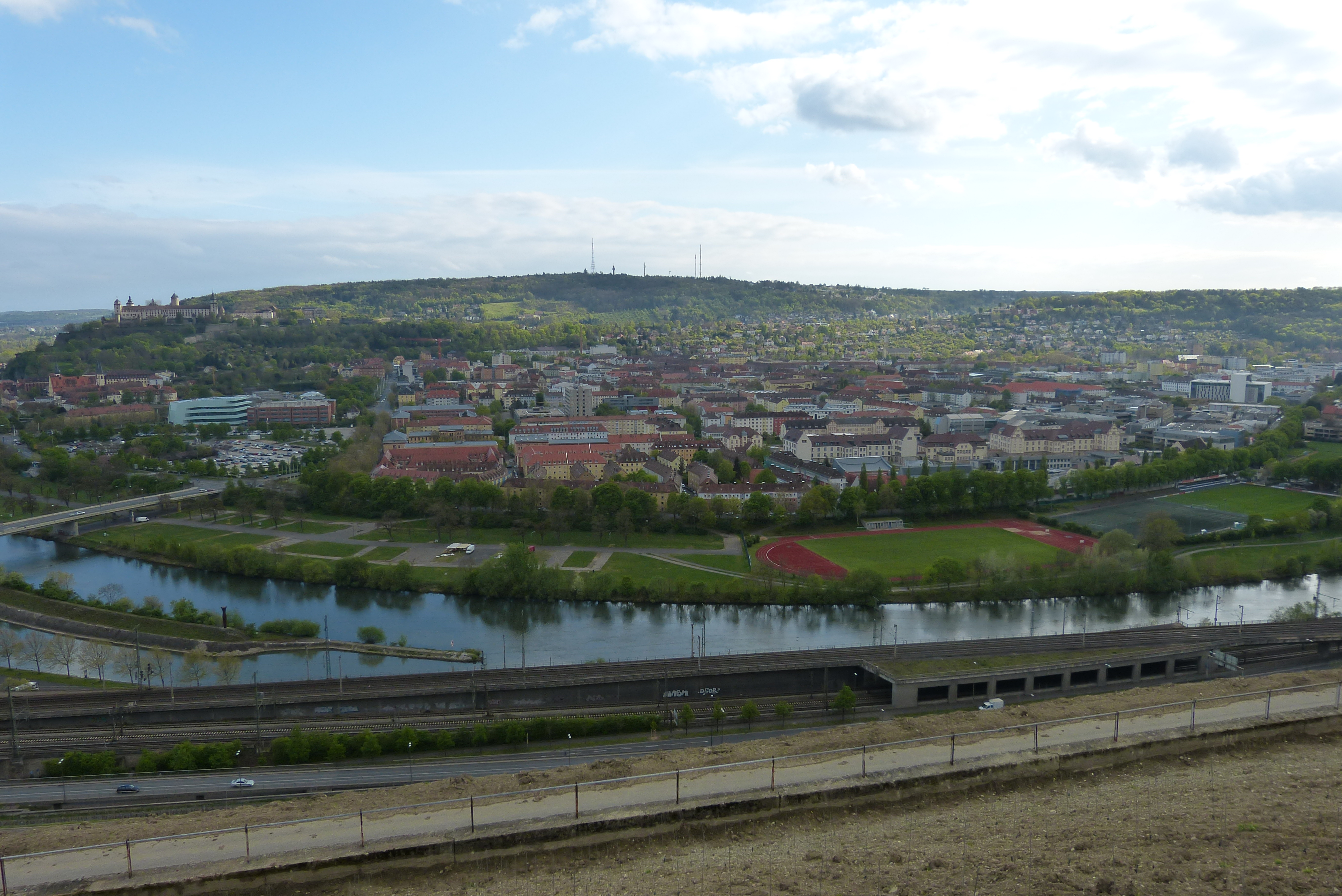 Blick vom Würzburger Stein auf das rechte Mainufer (Zellerau, Festung, ...)